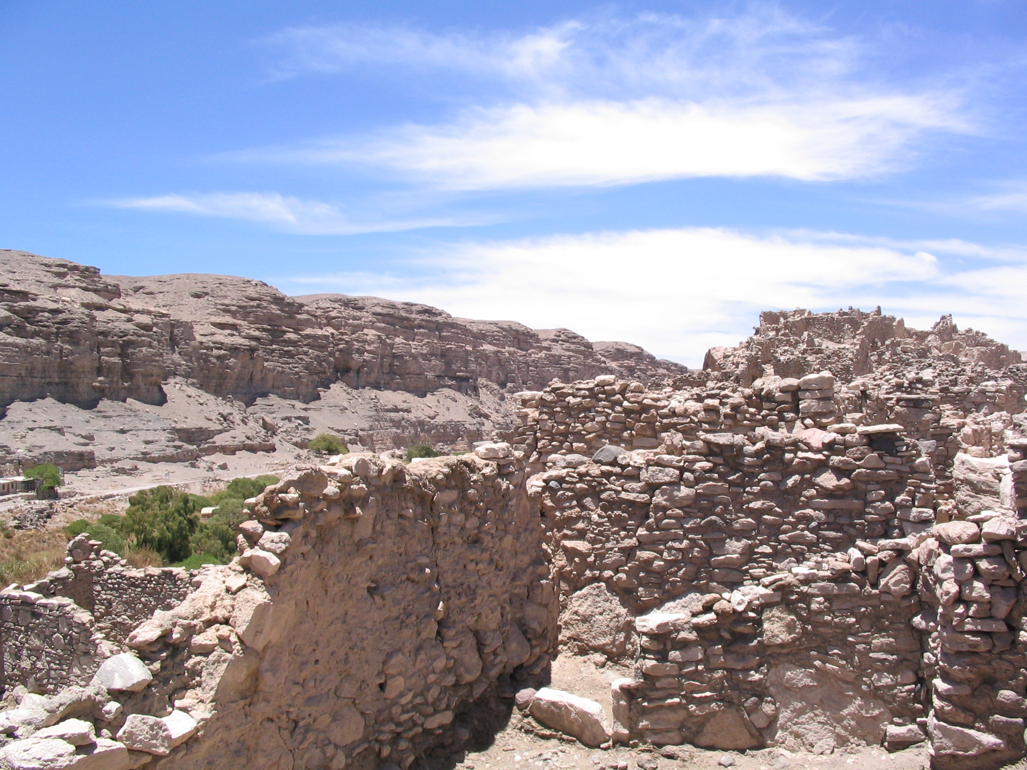 Pukará de Lasana, Chile.